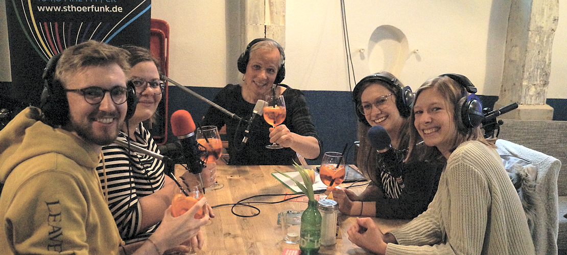 Wir plaudern live aus der Kneipe. Zu sehen sind v.l.n.r. Nils Kraft, Teresa Reith, Dana Diezemann, Theresa Ruther, Lea Weinmann